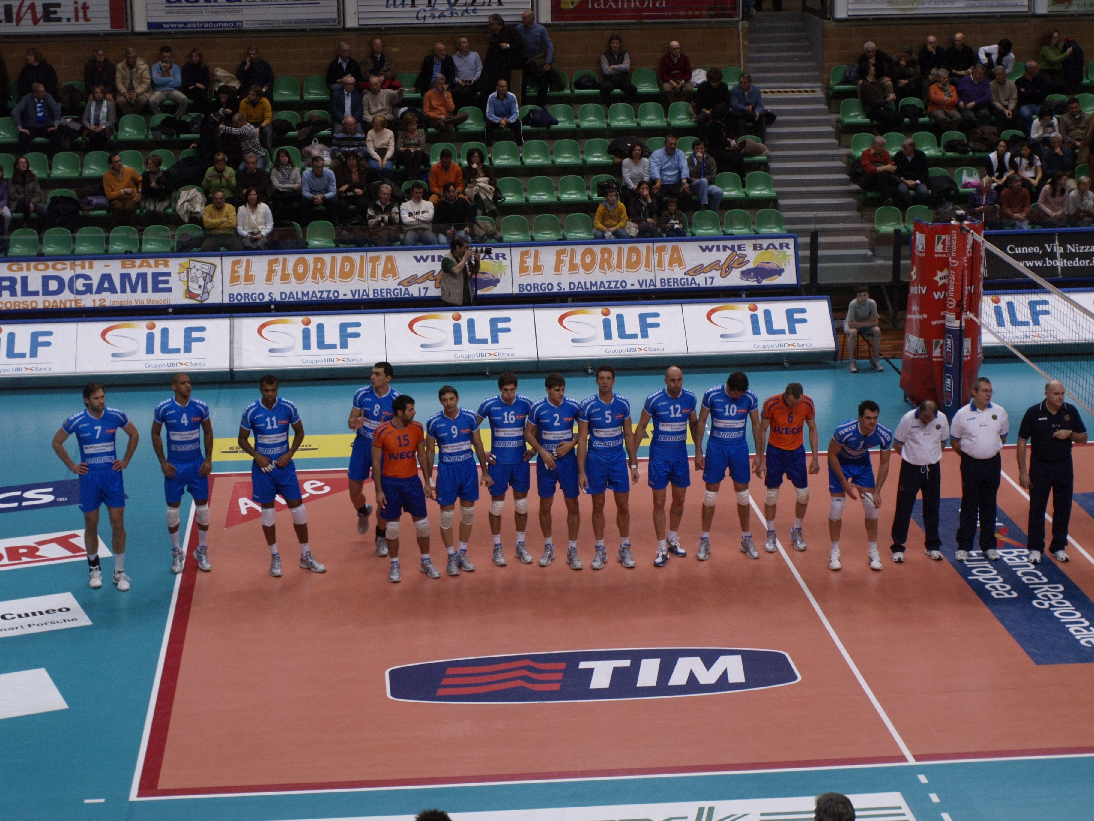 La squadra del Piemonte Volley che ha partecipato al campionato italiano di serie A1 nella stagione 2007-08